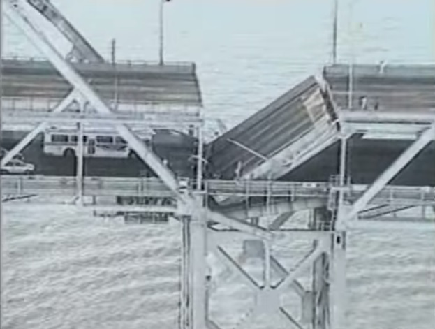 ロマ・プリータ地震によるサンフランシスコ・オークランド・ベイブリッジの被害